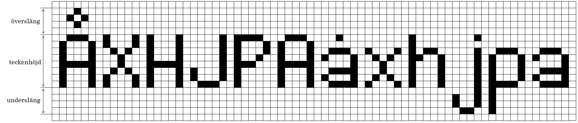 Termer teckenhöjd vis punktmatris-text